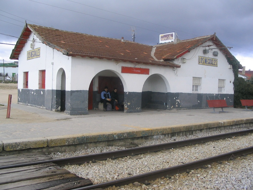 Estación de tren de Los Negrales (Alpedrete, Comunidad de Madrid, España).